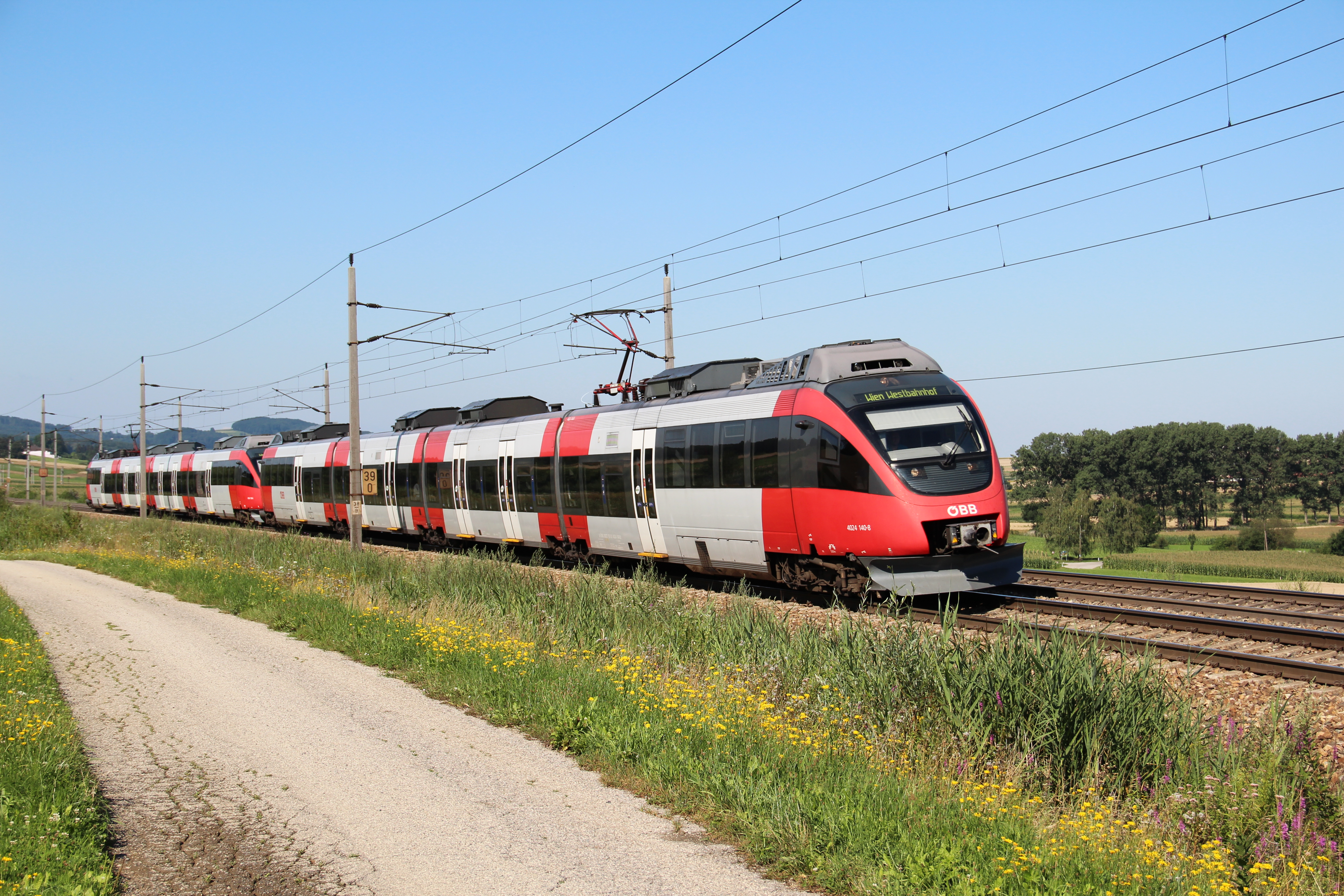 Zwei Triebwagen der ÖBB Baureihe 4024 sind hier gerade als Regionalzug am Weg von St. Pölten Hbf nach Wien Westbahnhof und werden in Kürze in Neulengbach einfahren.